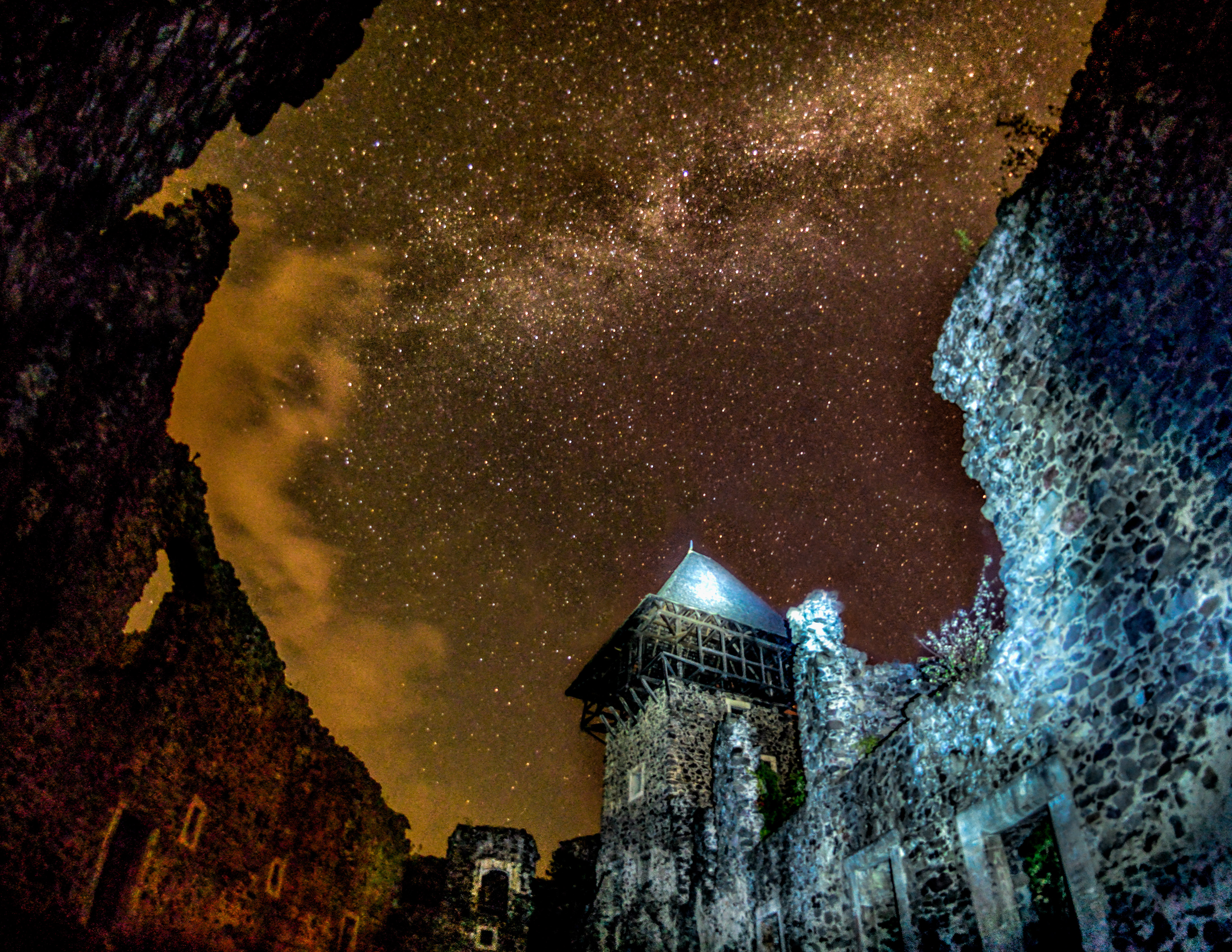 Замок (мур.), Невицьке